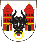 znak města Přerov